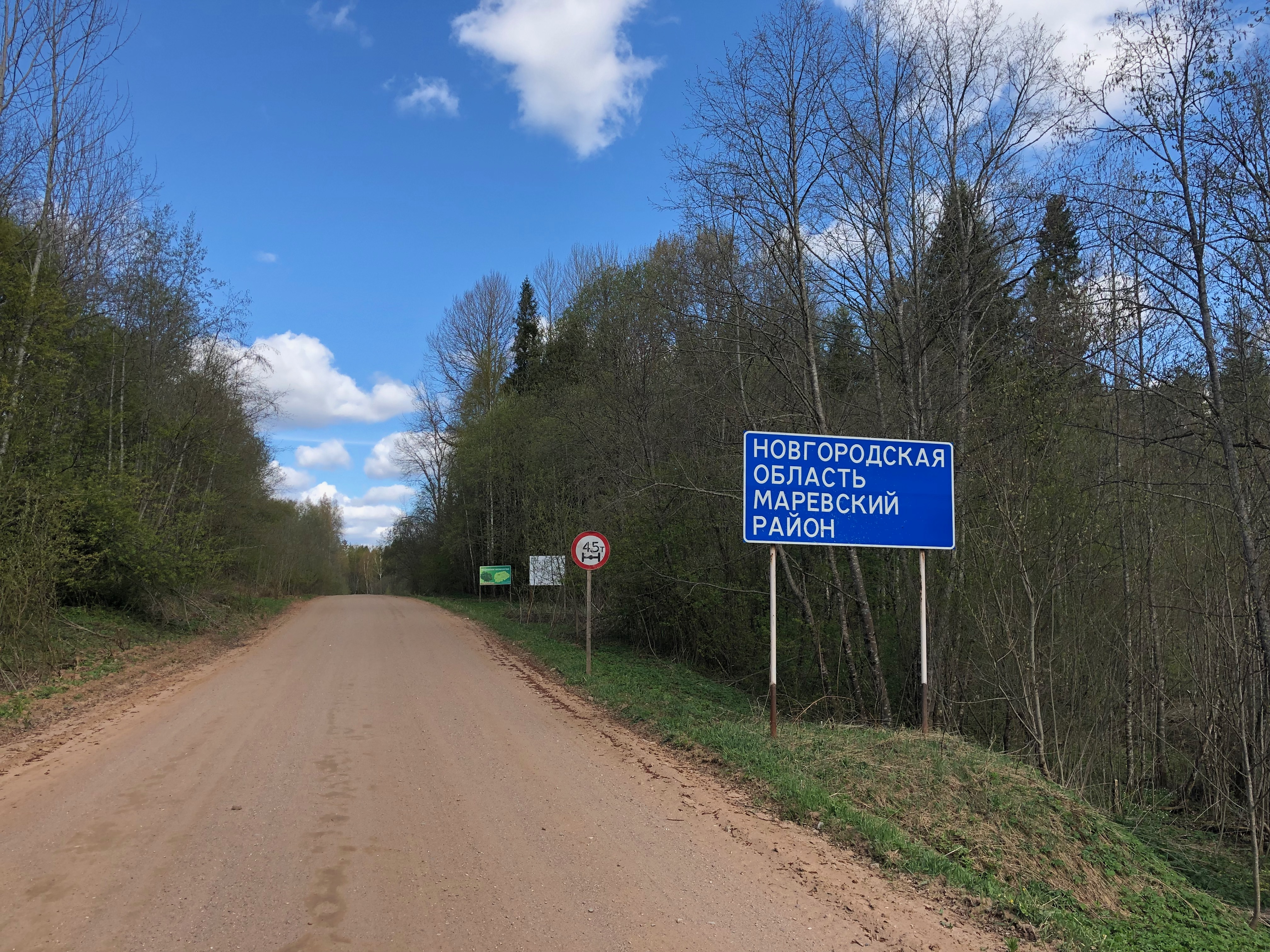 Граница с Тверской областью